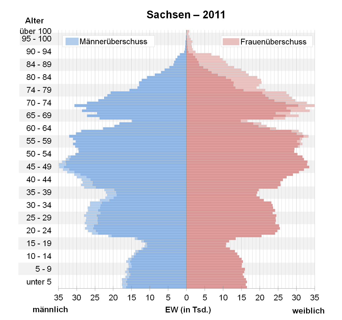 Bevölkerungspyramide des Bundeslandes Sachsen nach Zensus 2011.